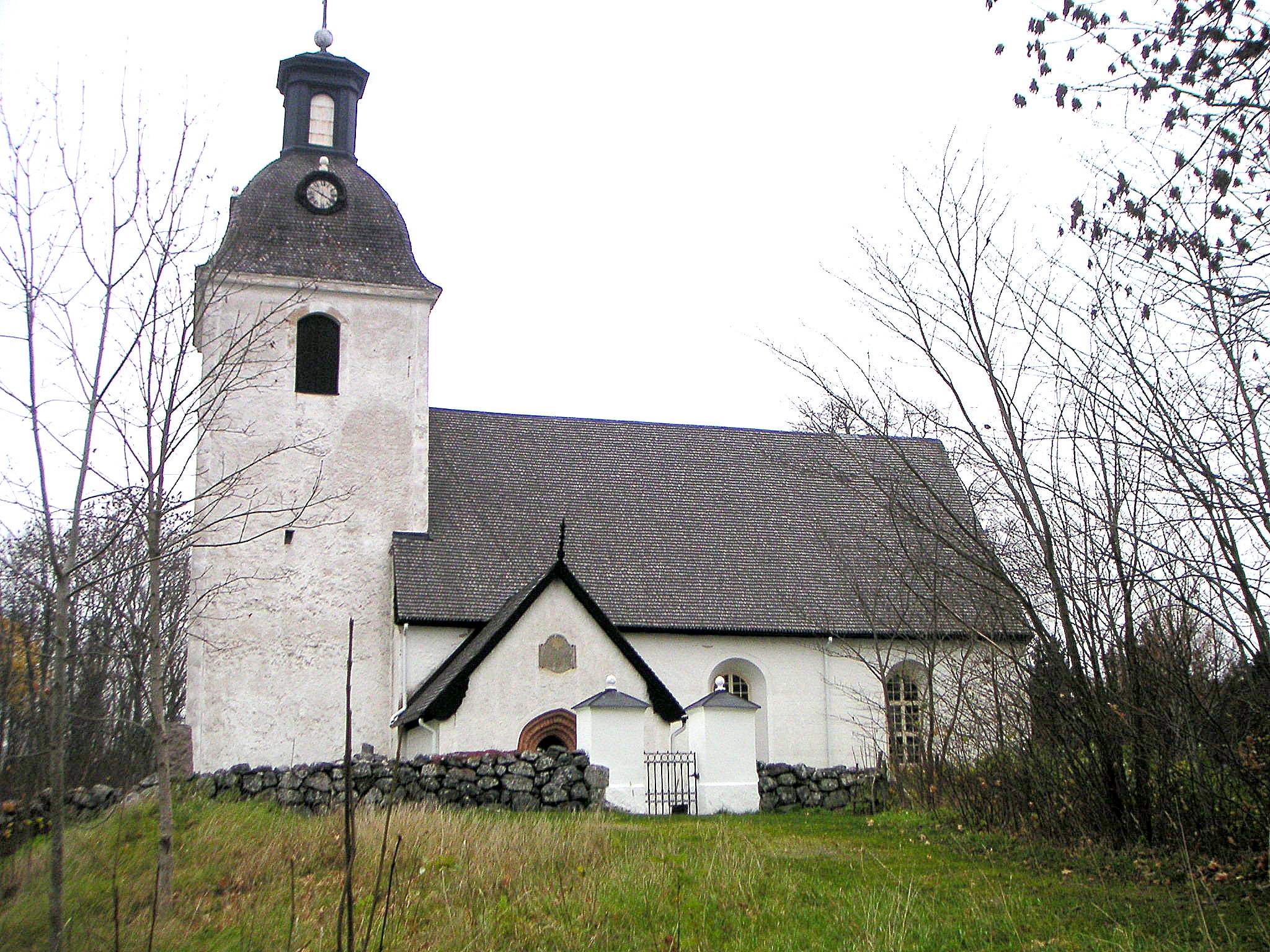 Husby-Sjutolfts kyrka